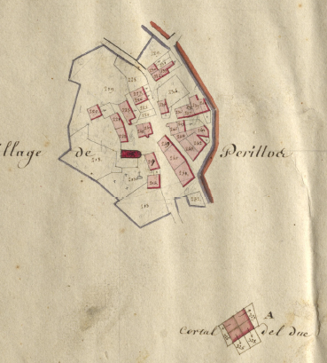 Perellós, d'Òpol i Perellós, en el Cadastre napoleònic del 1812 (Arxius Departamentals dels Pirineus Orientals, ADPO)